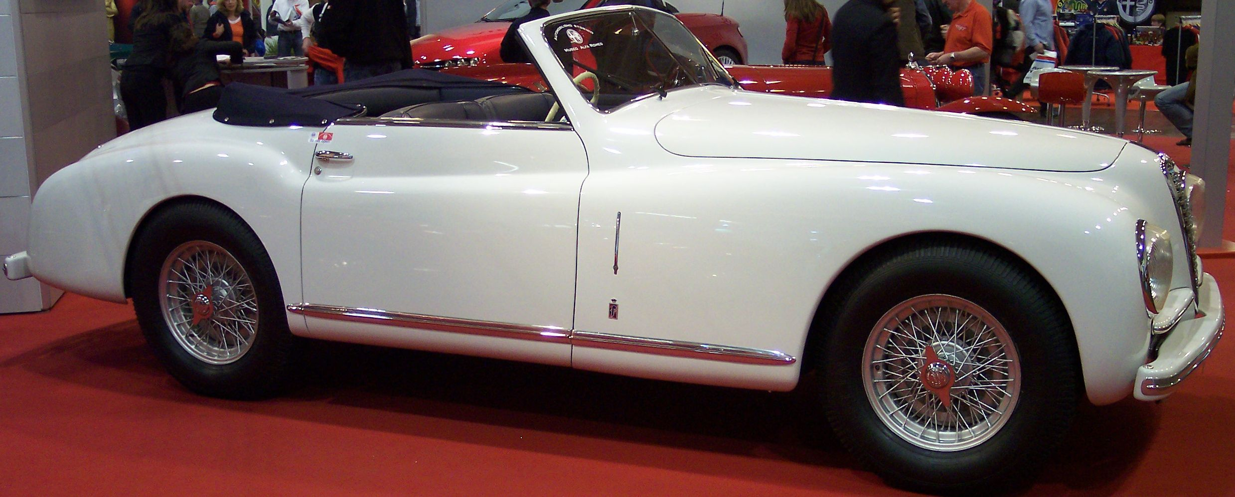 Alfa Romeo 6C 2300 Sport Cabriolet 1947